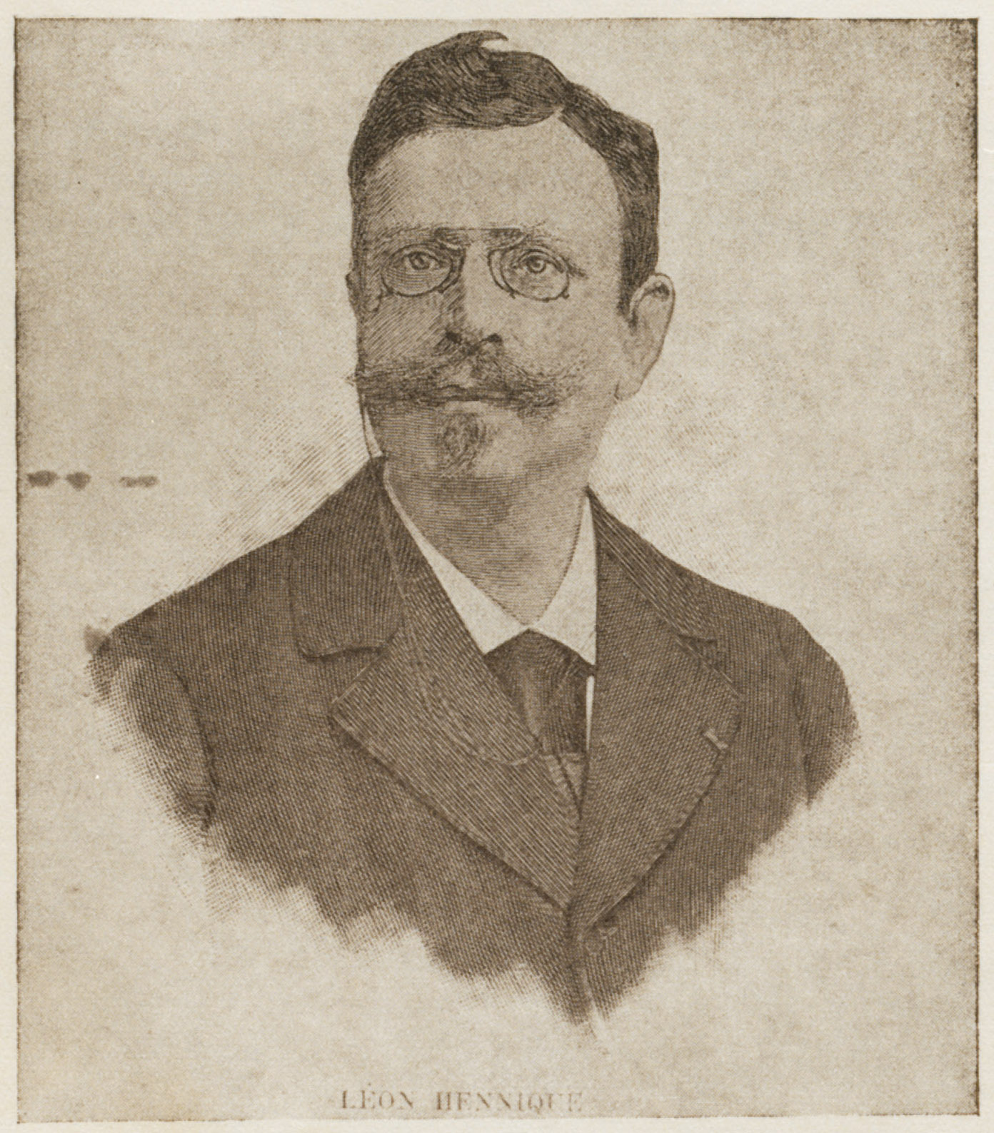 Portrait de Léon Hennique